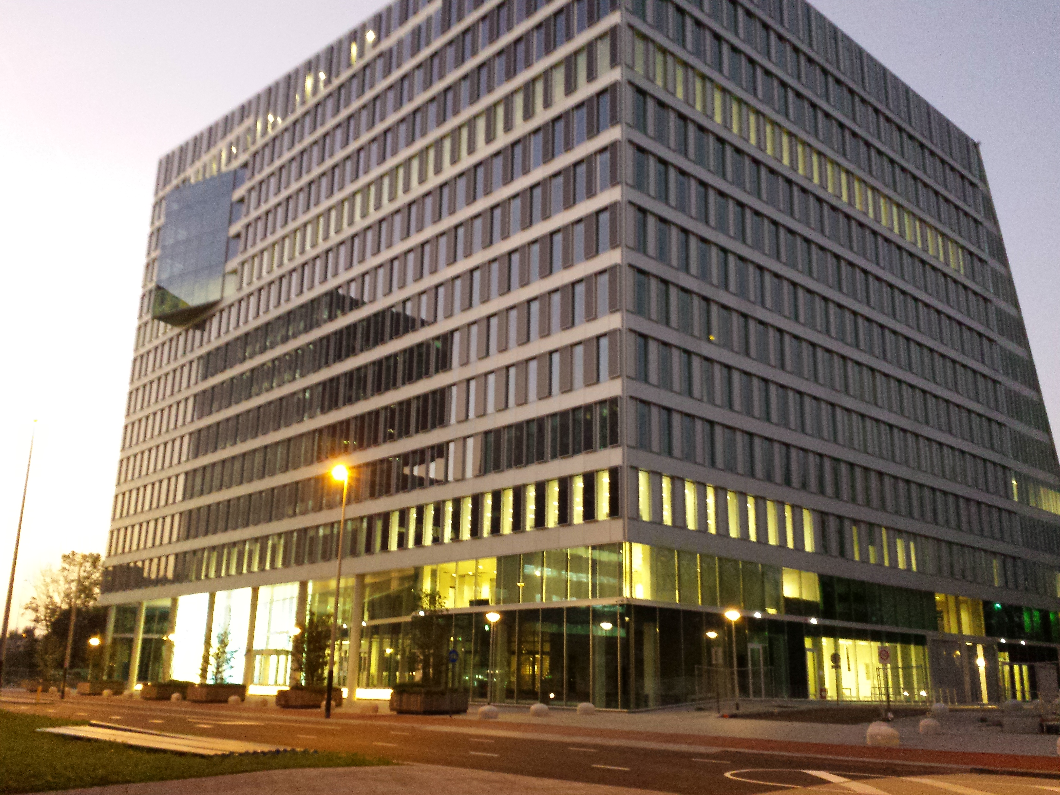 Zuidas, Amsterdam, Netherlands